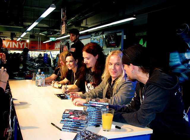 Nightwish em sessão de autógrafos em Hamburgo.